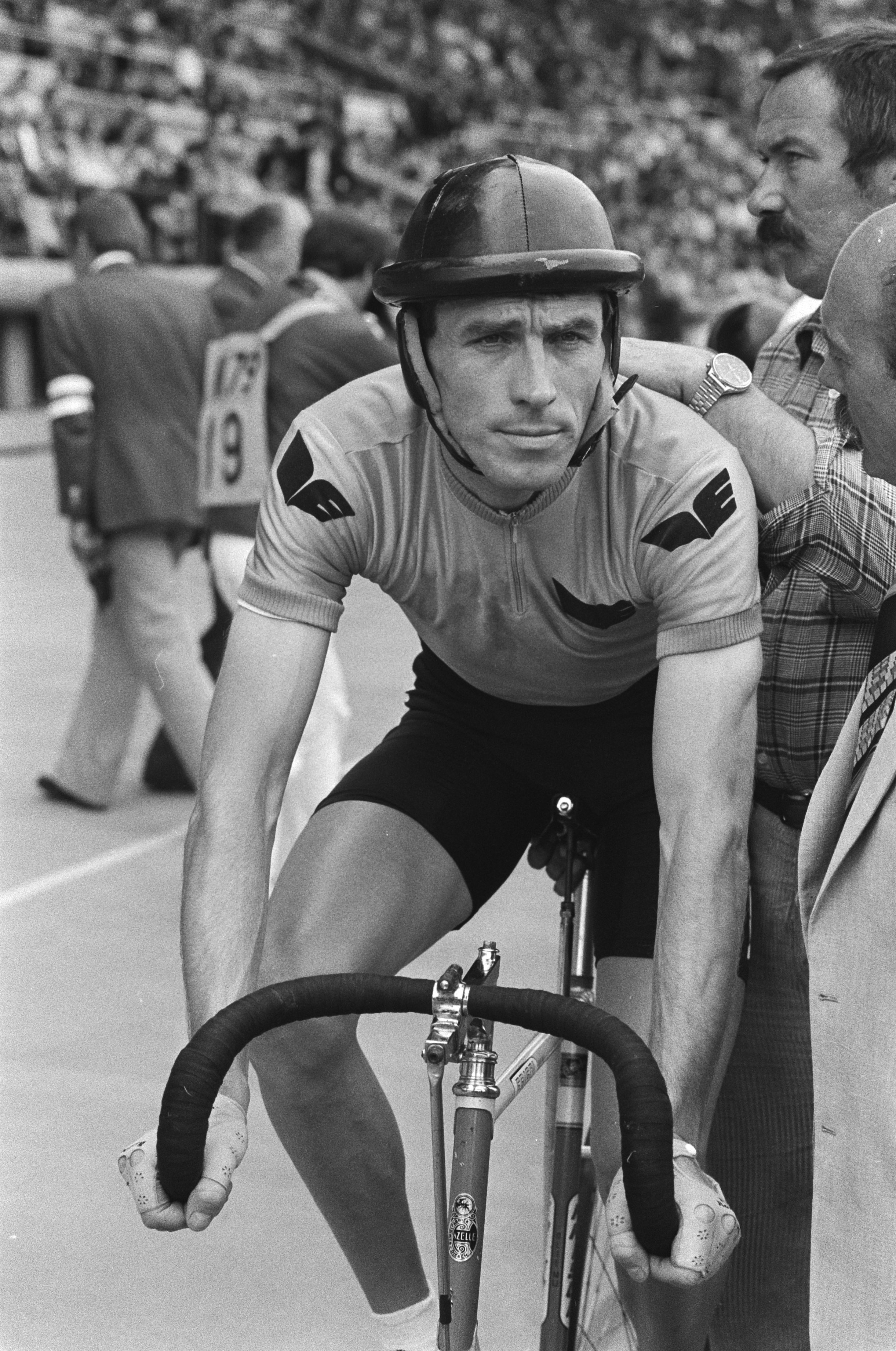 Collectie / Archief : Fotocollectie Anefo Reportage / Serie : Wereldkampioenschappen Wielrennen 1979 in het Olympisch Stadion in Amsterdam, stayeren voor profs Beschrijving : Fred Rompelberg Annotatie : Randnummers negatiefstrook: no 7+8: Fred Rompelberg; no. 9+10: Martin Venix Datum : 2 september 1979 Locatie : Amsterdam, Noord-Holland Trefwoorden : portretten, sport, wielrennen Persoonsnaam : Rompelberg, Fred Instellingsnaam : Olympisch Stadion Fotograaf : Suyk, Koen / Anefo Auteursrechthebbende : Nationaal Archief Materiaalsoort : Negatief (zwart/wit) Nummer archiefinventaris : bekijk toegang 2.24.01.05 Bestanddeelnummer : 930-4212